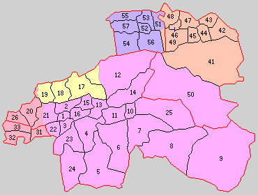 後の福岡県浮羽郡・八女郡域の町村制時点の町村。